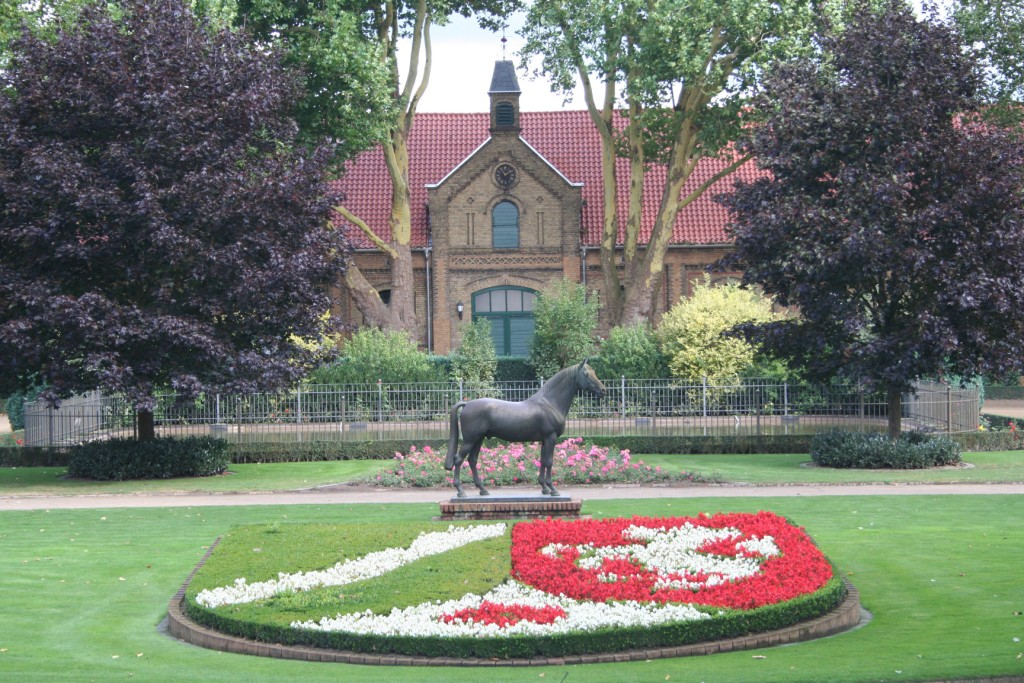 Rondell